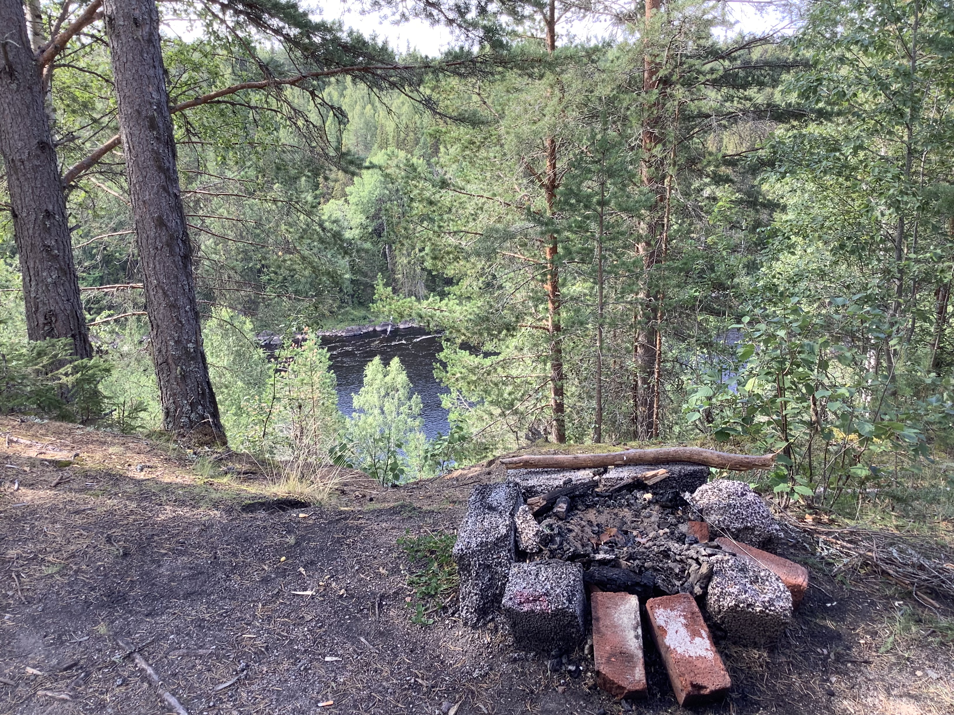 Mellanljusnans naturreservat i Ljusdals kommun, Gävleborgs län. Strandbrinken vid Ljusnan.